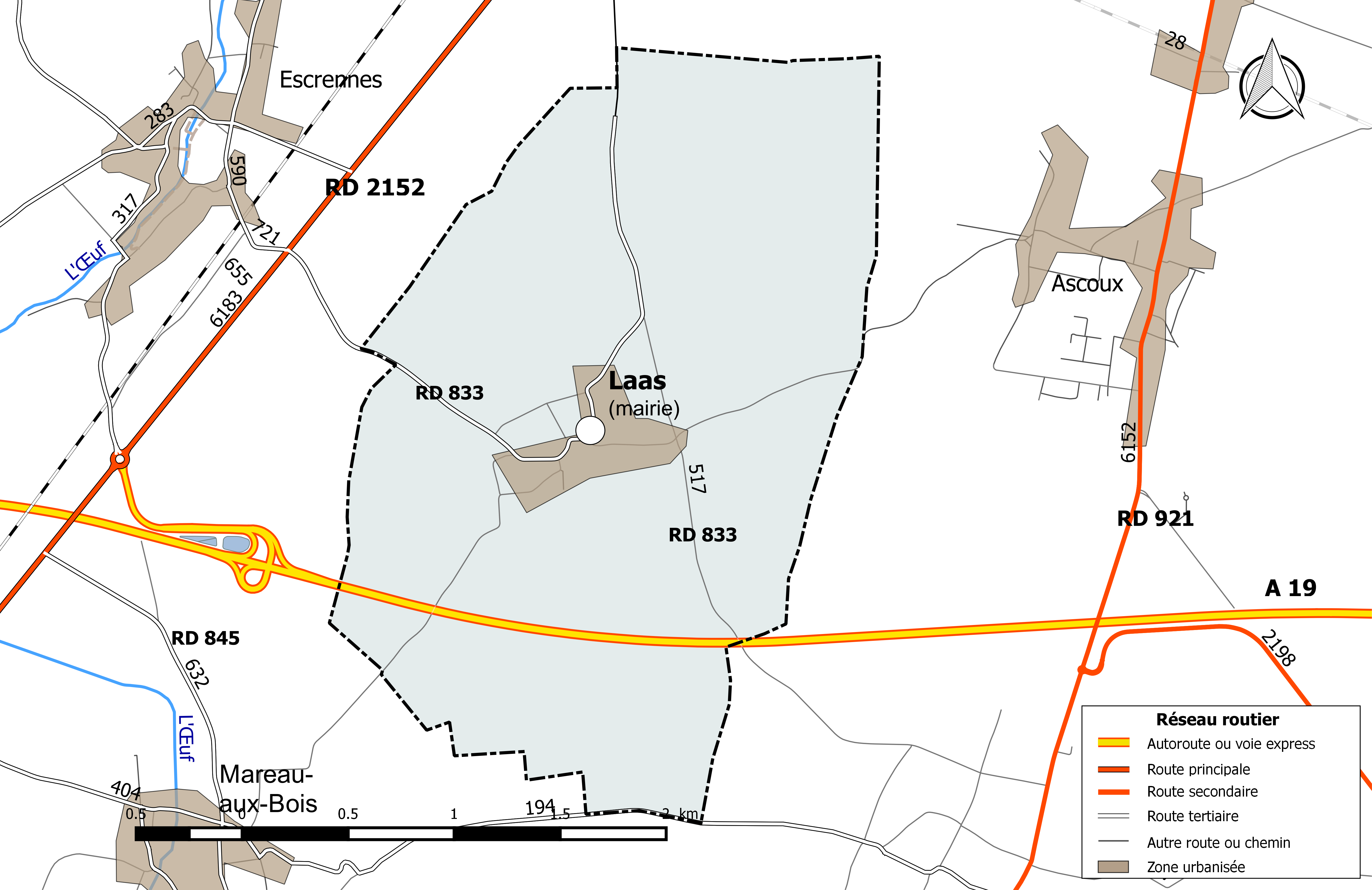 Carte du réseau routier de la commune de Laas (Loiret).